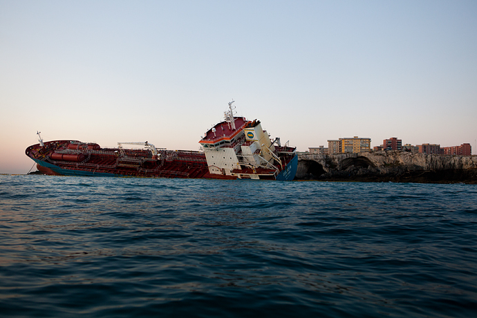 La nave Gelso M naufragata nella rada di Santa Panagia - Siracusa - Sicilia